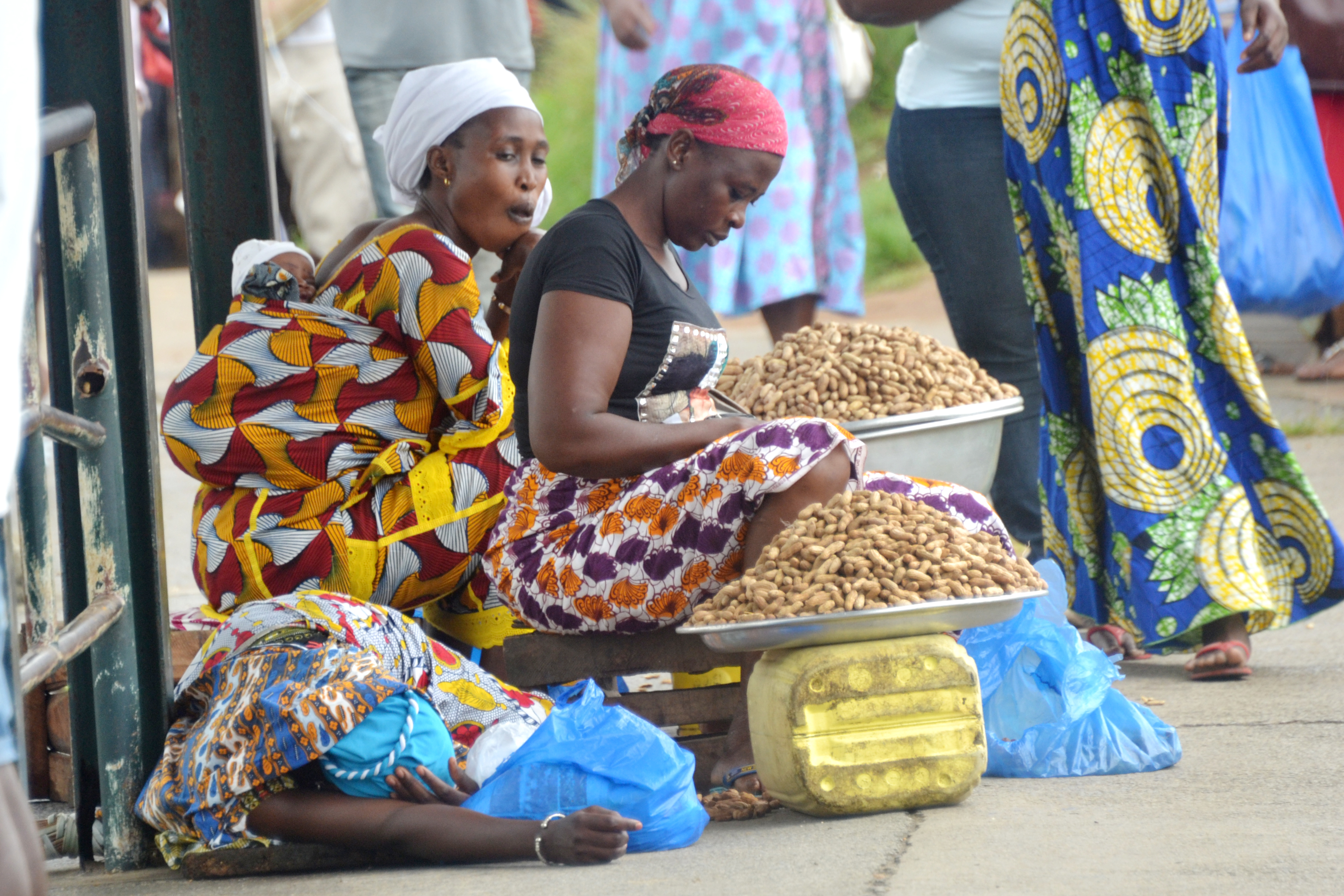 vendeuses d’arachides dans les rues d'Abidjan This is an image of "African people at work" from Ivory Coast